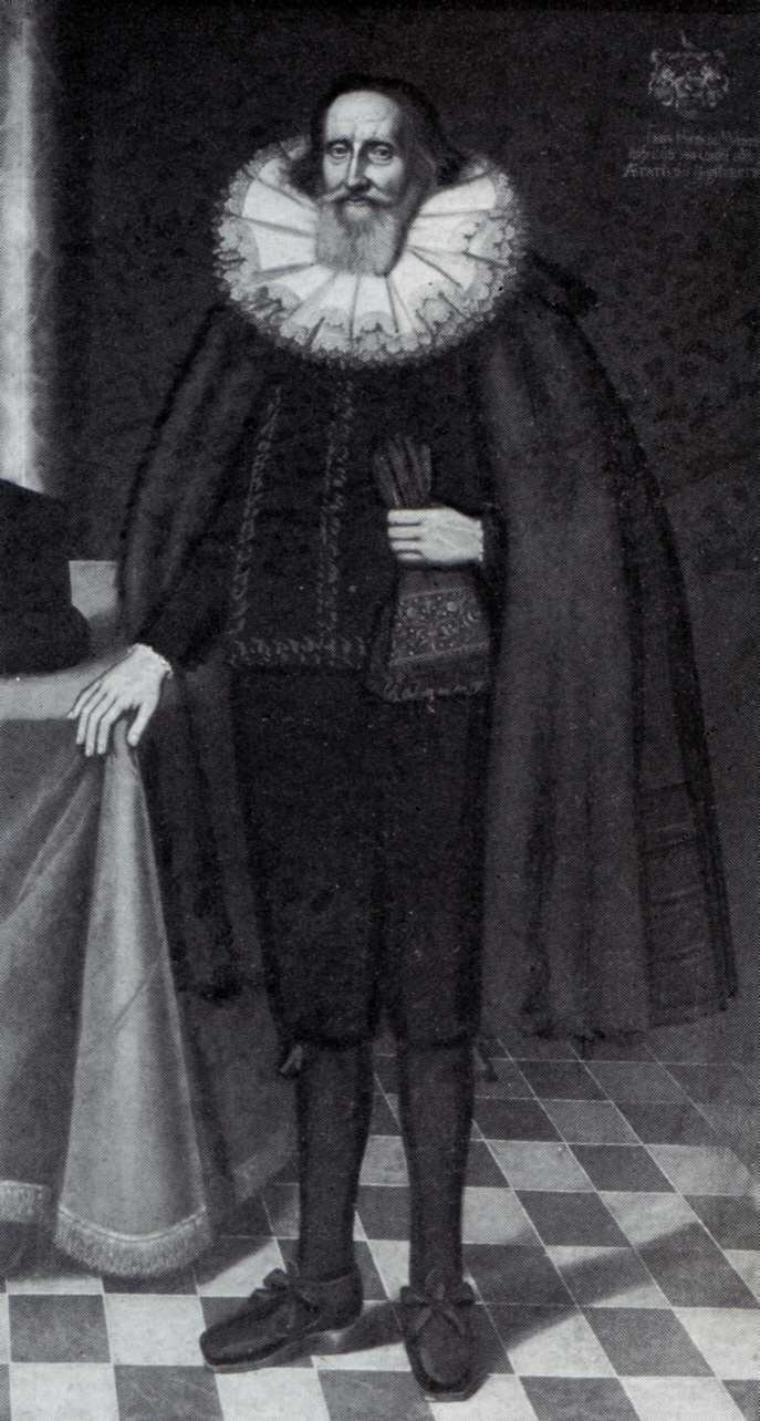 Heinrich Wedenhof (* 1584; † 9. Januar 1651), Lübecker Bürgermeister